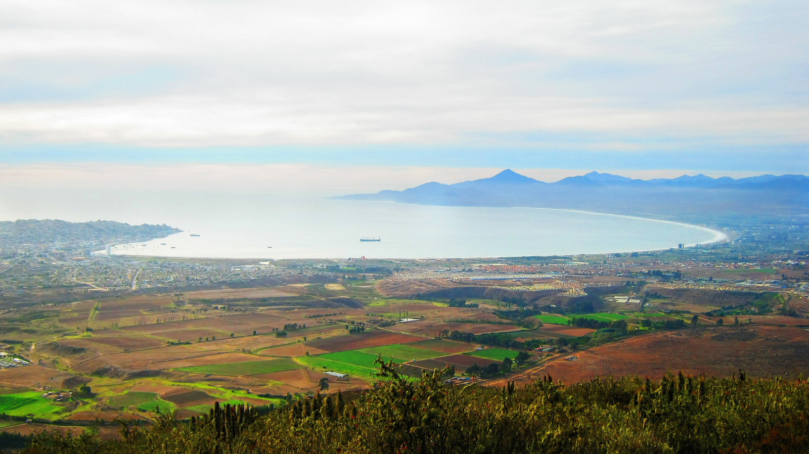 Bahía de la Herradura, Coquimbo